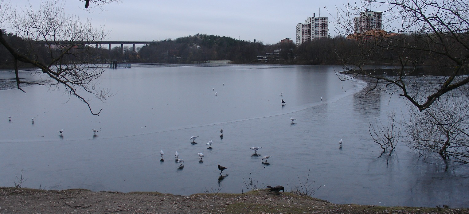 Trekanten, sett från Liljeholmens tunnelbanestation.jpg